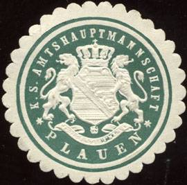 Sealing stamp Title: Königlich sächsische Amtshauptmannschaft Plauen Description: geprägt, grün, weiß Place: Plauen size: 3 cm